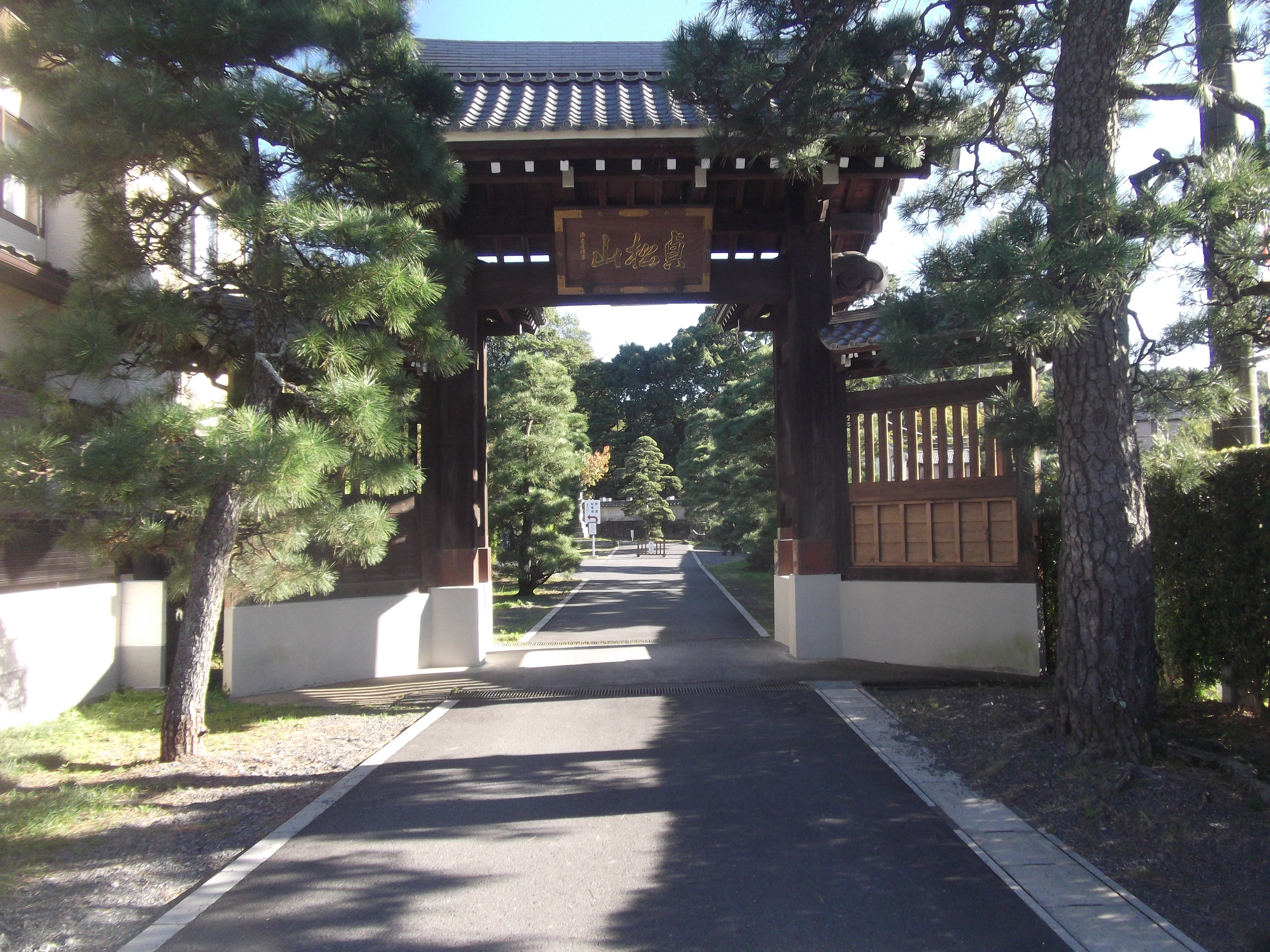 静岡市葵区沓谷にある貞松山蓮永寺の山門。